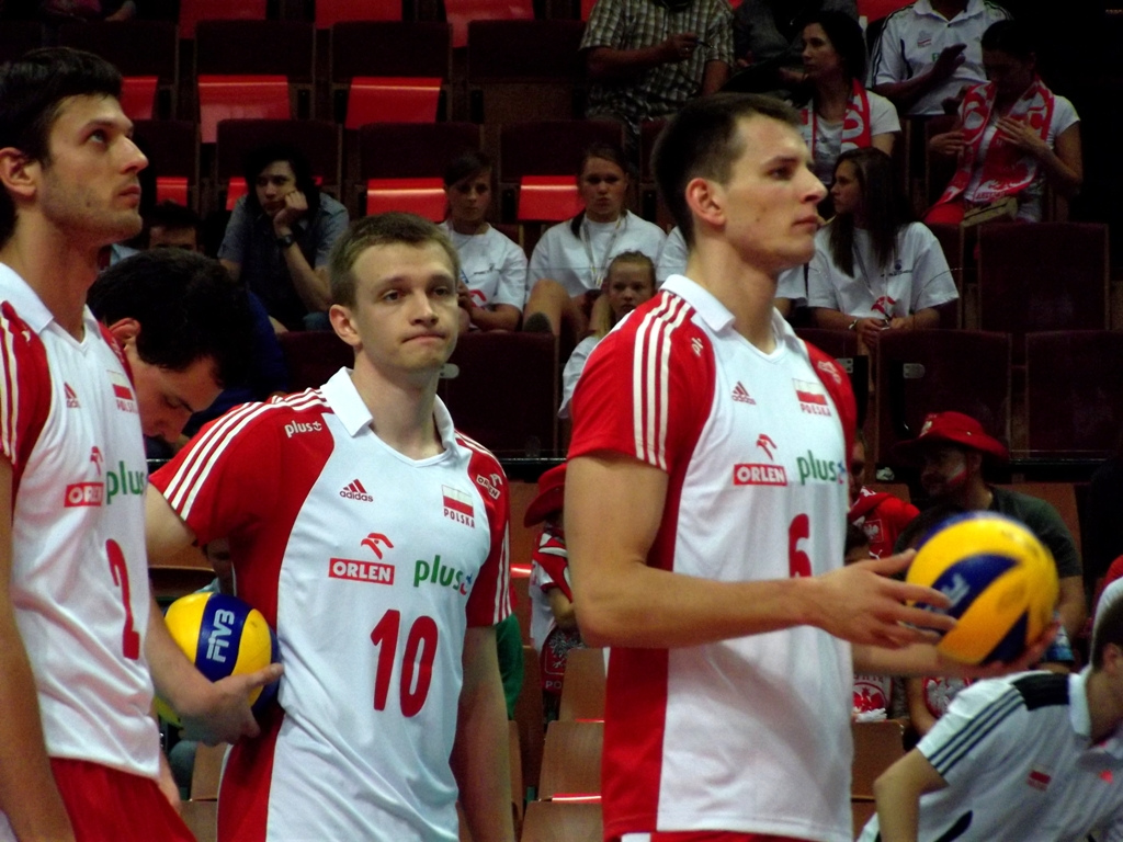 Zdjęcie zrobione podczas zawodów Ligi Światowej 2012 w katowickim Spodku.